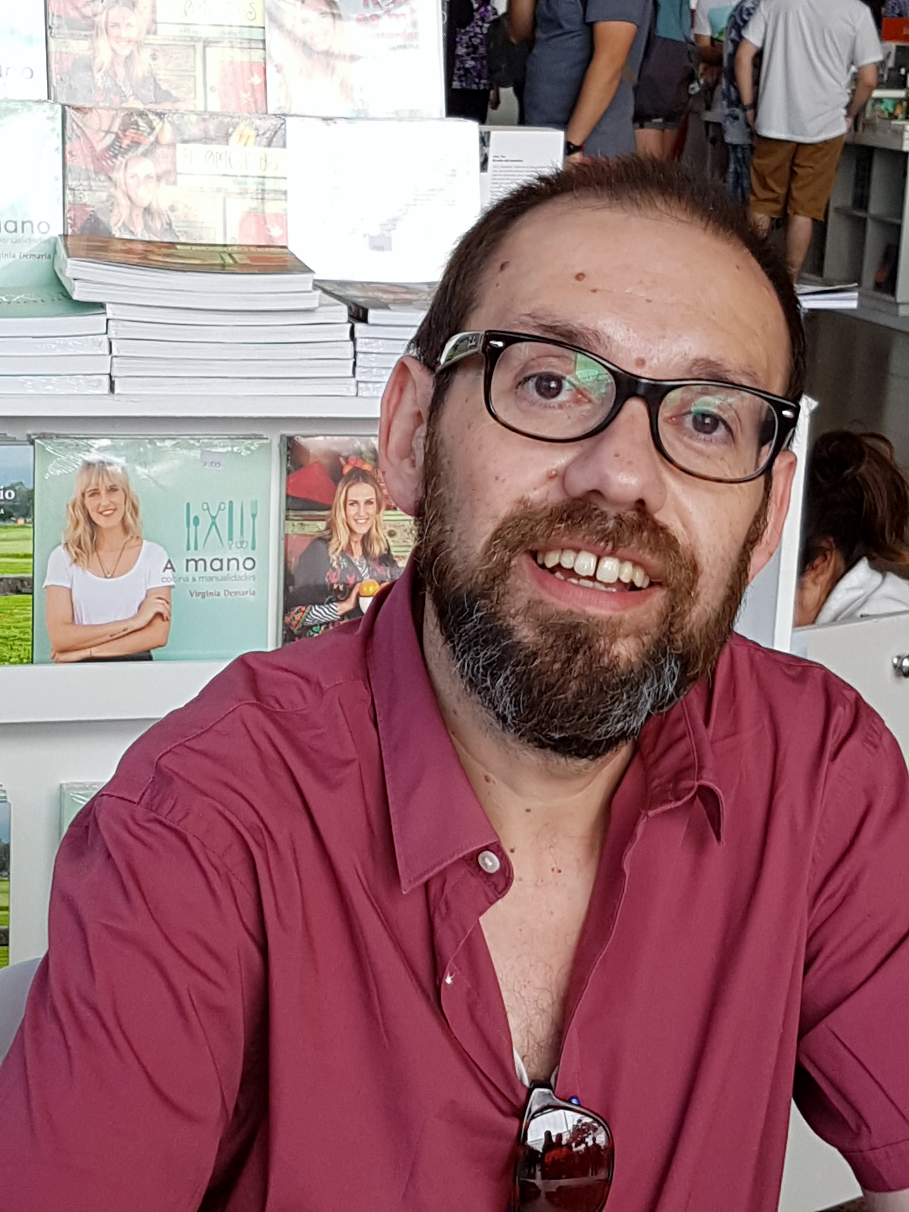 El escritor chileno Francisco Ortega en la Feria Internacional del Libro de Santiago 2017. El 11 de noviembre fue su primera aparición pública después del accidente que sufrió en una lancha de la Armada en septiembre en el canal Beagley y de la úlcera que tuvo después.